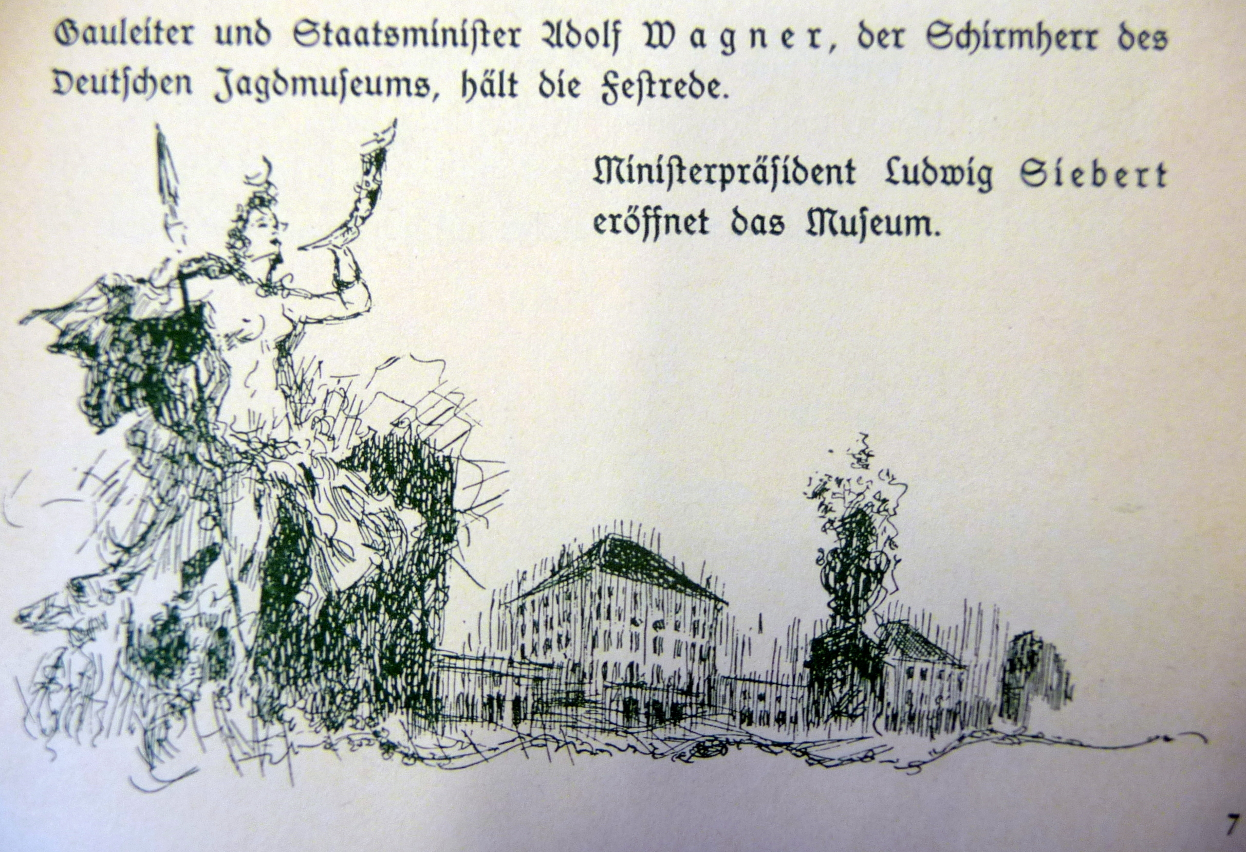 Illustration aus der Festschrift anlässlich der Einweihung des Deutschen Jagdmuseums im Nordflügel von Schloss Nymphenburg im Oktober 1938.